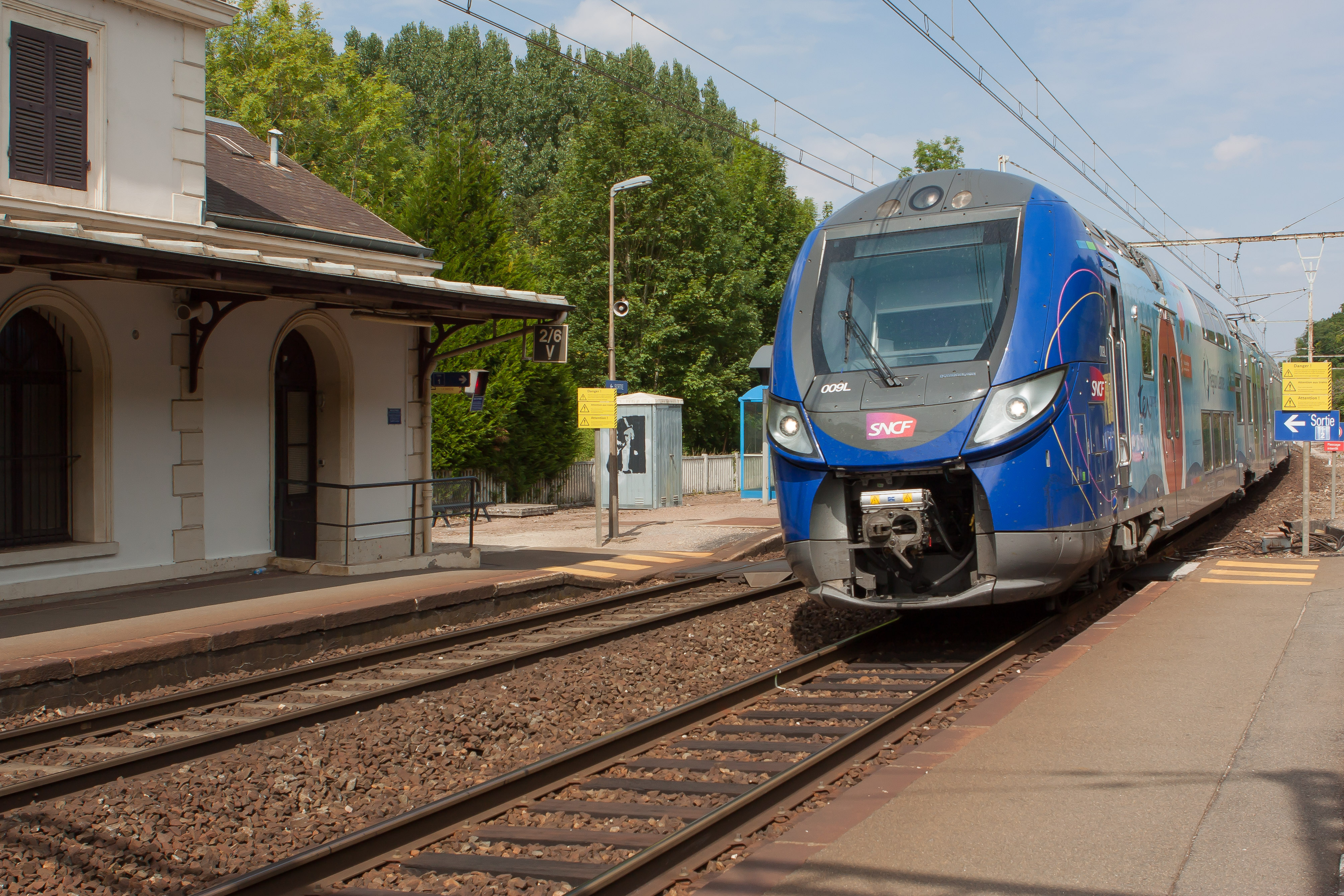 La rame 009L d'un train Regio 2N, assurant une liaison TER-Centre-Val de Loire, en gare de Jouy, en provenance de Paris et en direction de Chartres ( (Gare de Jouy / Eure-et-Loir / France)